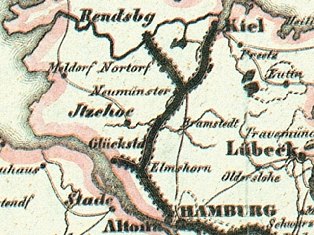 Ausschnitt Altona-Kiel aus der Bahnkarte_Deutschland_1849